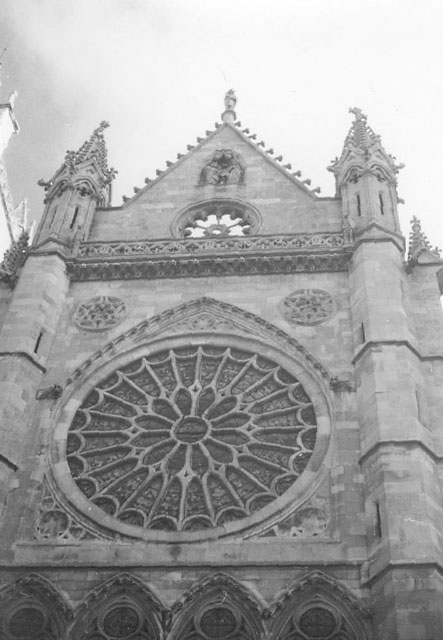 Catedral - León - Fotografía. Papel 750 x 105 mm B/N